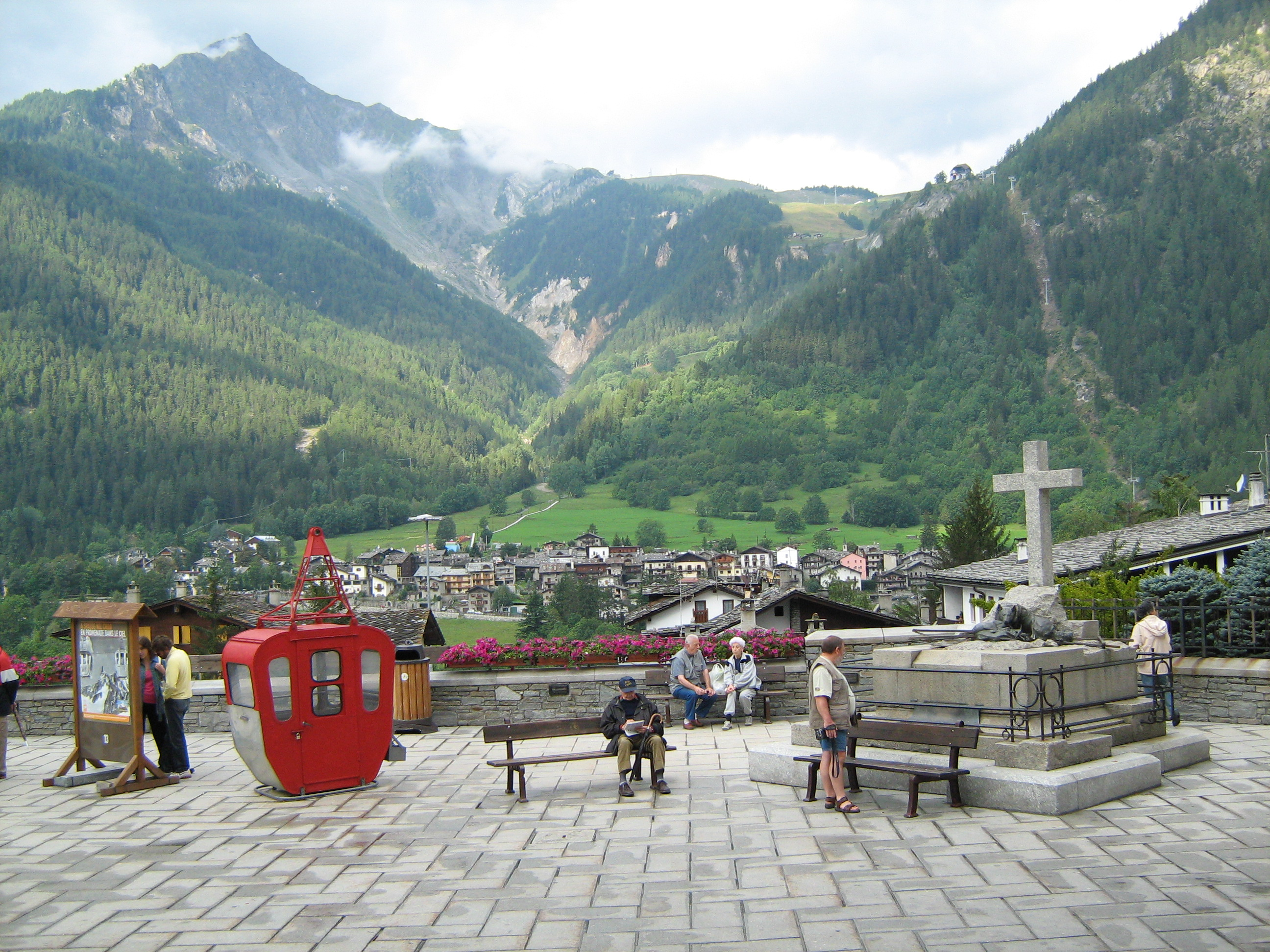 Torv midt på gågaden Via Roma i Courmayeur